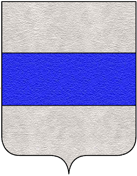 Stemma della famiglia Barozzi, appartenente al patriziato di Venezia.